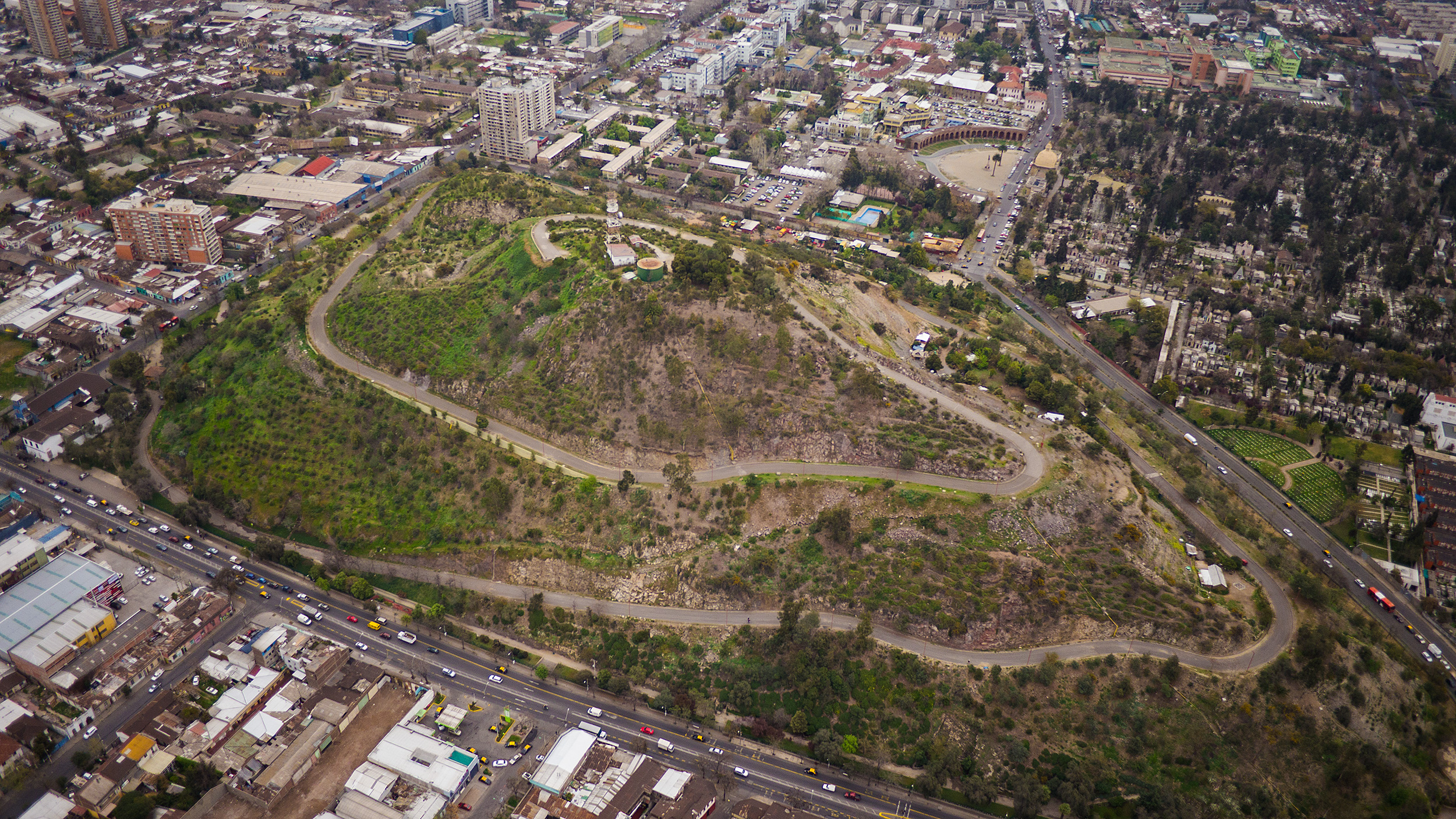 Cerro Blanco, Santiago de Chile.